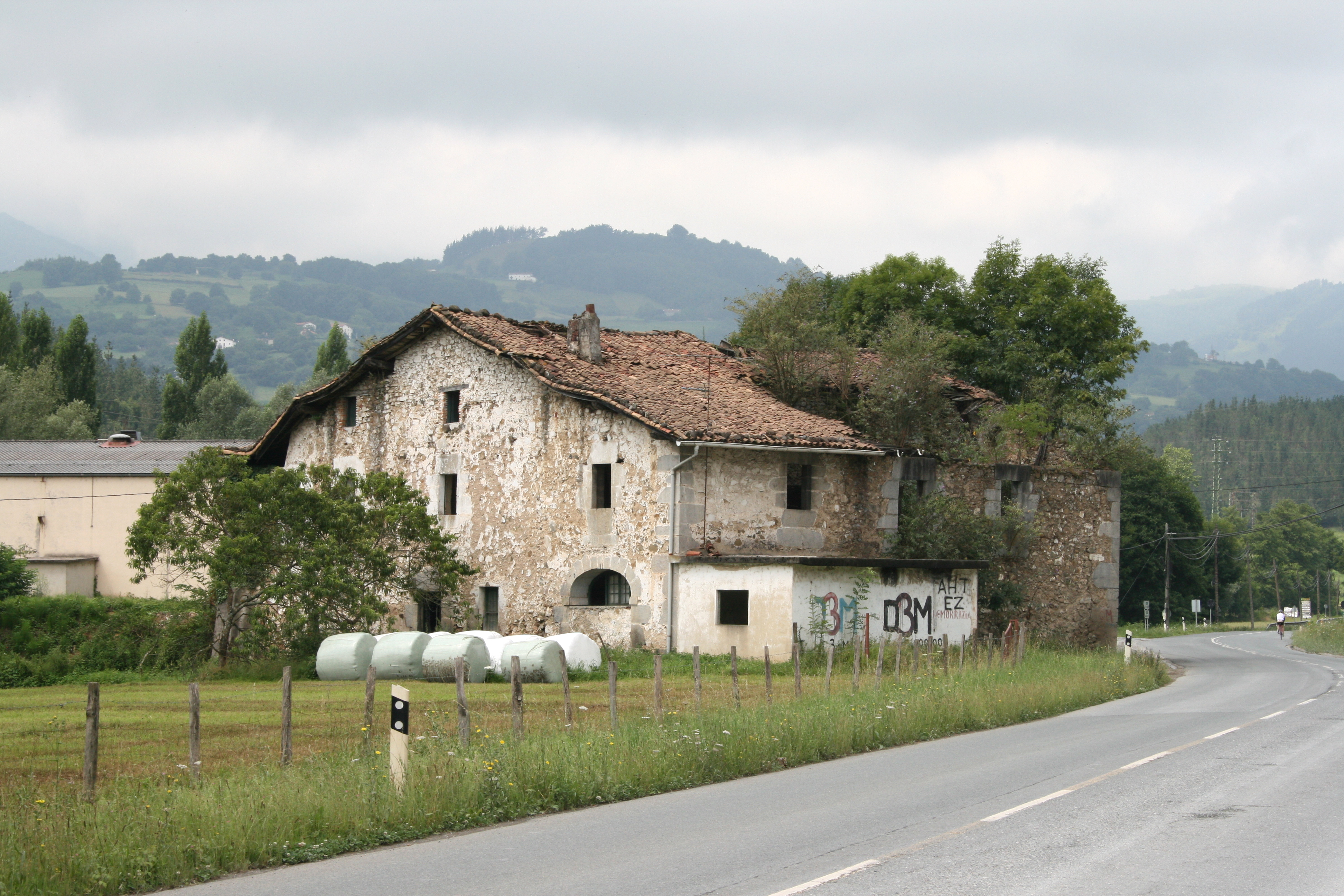 Zizurkilgo Luzuriaga oinetxea, goitik behera erortzear dagoena.